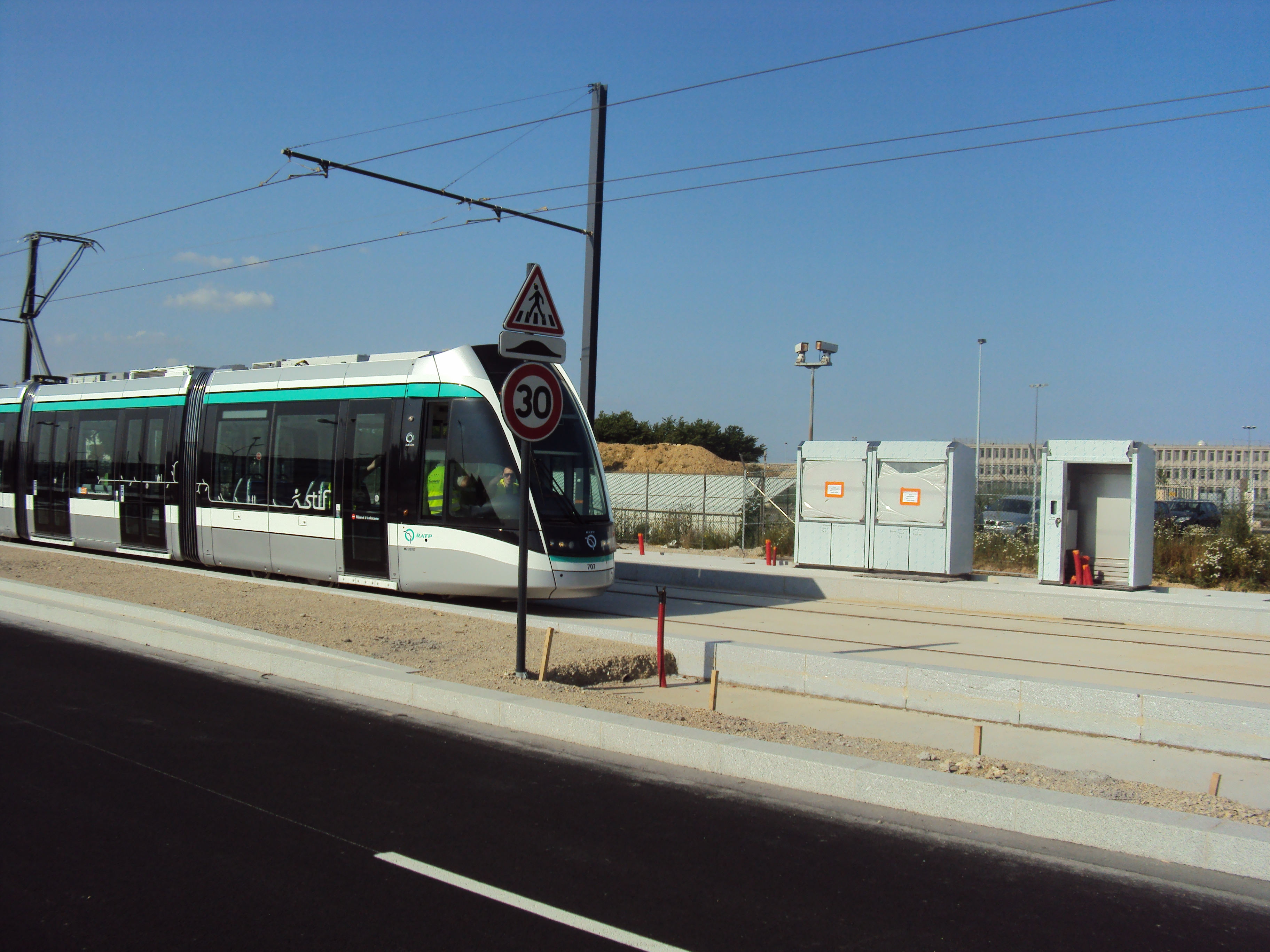 Les voies du T7 dans l'aéroport d'Orly